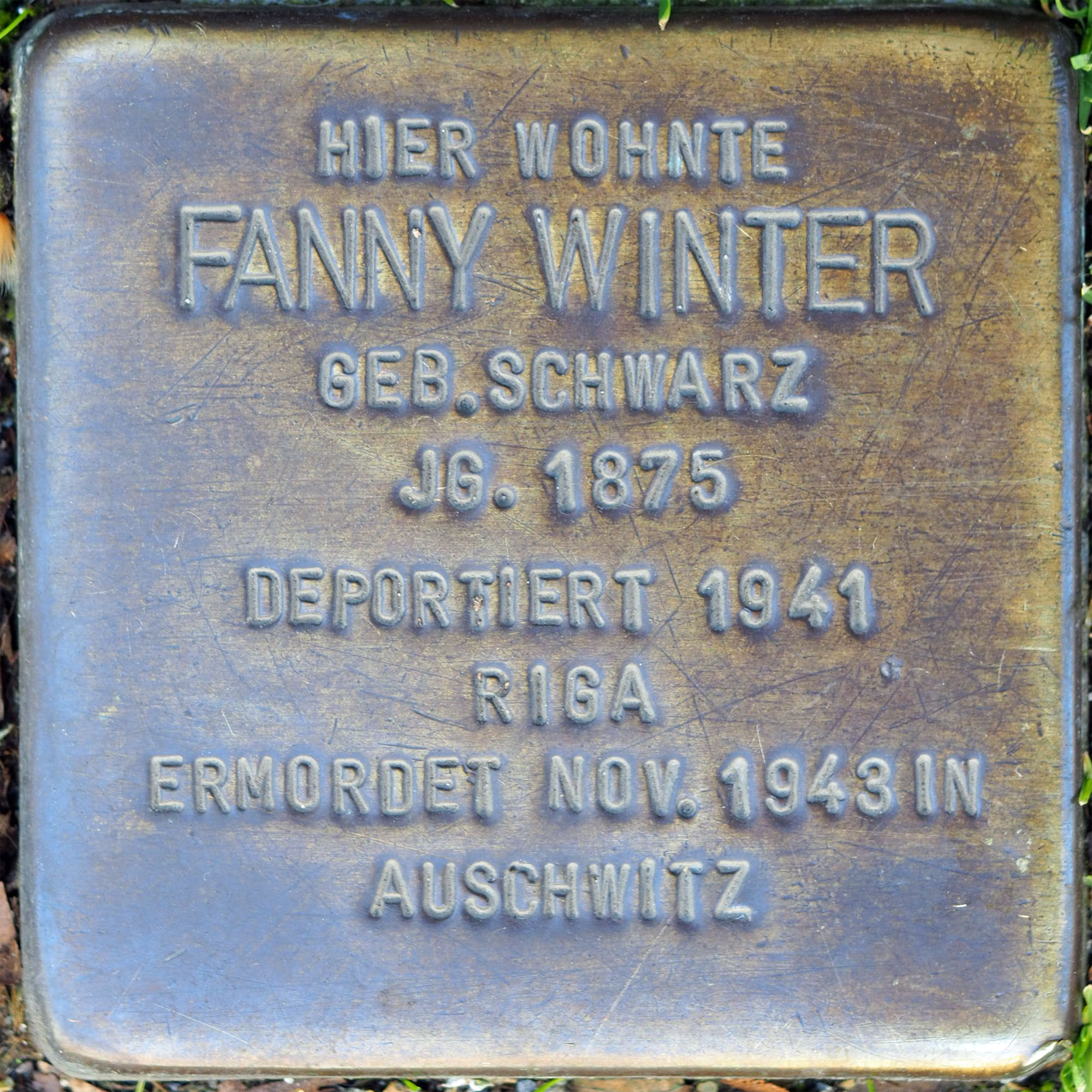 Stolpersteine Korschenbroich: Winter, Fanny